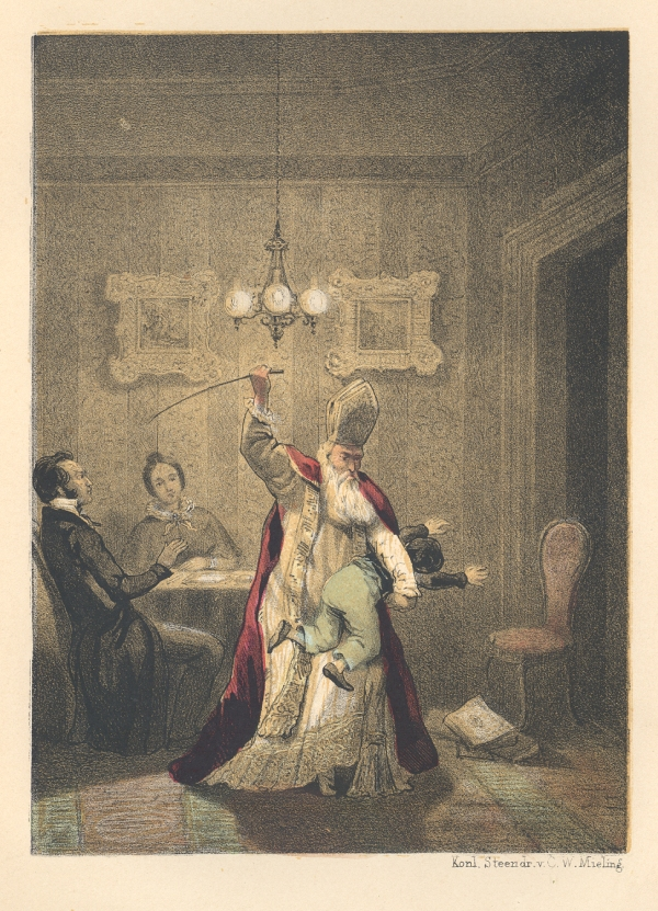 Sint Nikolaas-vertellingen voor de jeugd / door C. van Schaick. - Schiedam : Roelants, [1849]. - 86 p, [6] bl. pl. : ill. ; 24 cm